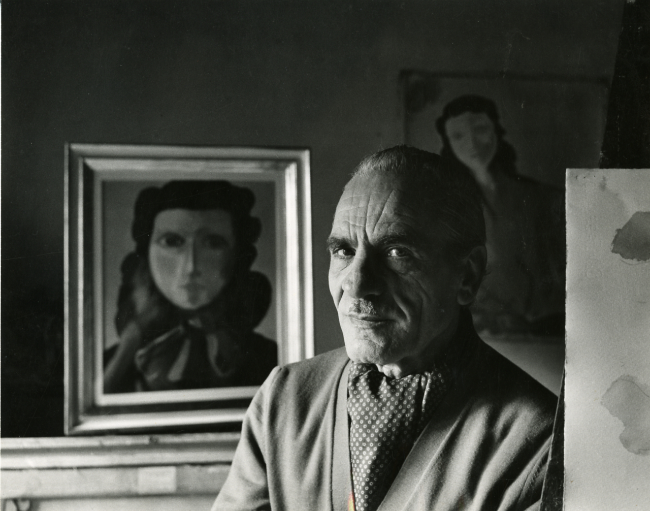 Servizio fotografico : Italia, 1952 / Paolo Monti. - Stampe: 3 : Positivo b/n, gelatina bromuro d'argento/ carta, 24x30. - ((Al verso delle stampe manoscritto: "1952. Virgilio Guidi". Sul coperchio della scatola manoscritto: "Ritratti".